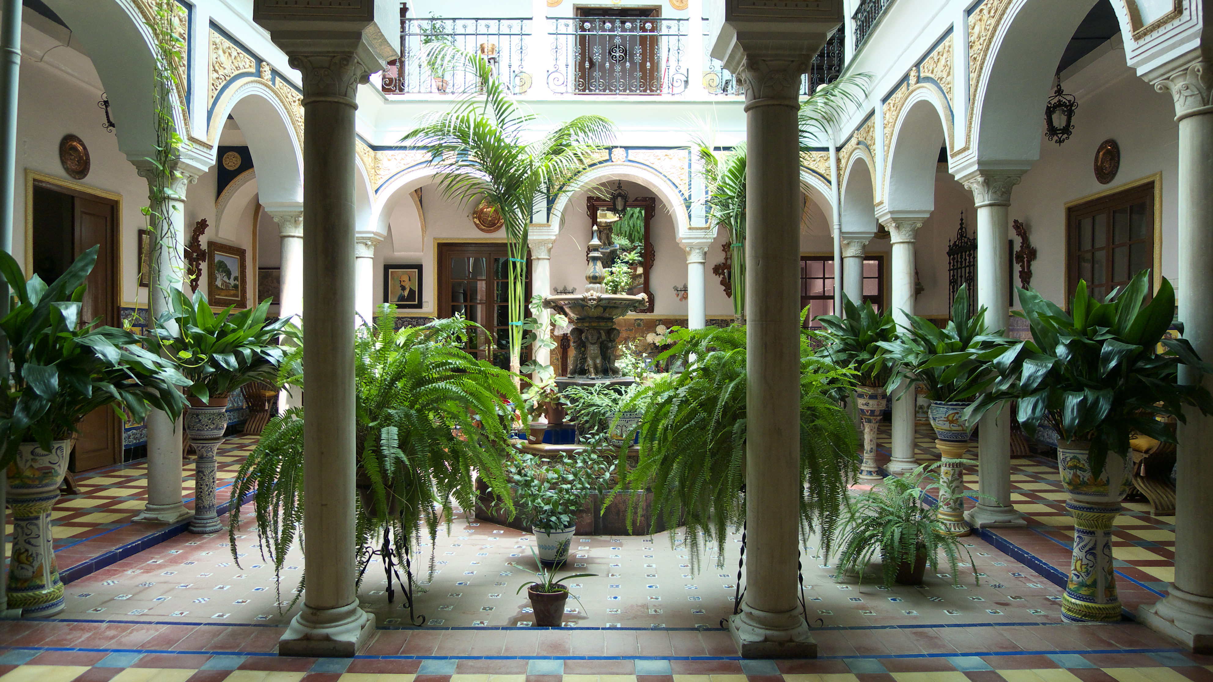 Patio privado de una vivienda en Moguer. Casa número 11 situada en la Calle Burgos y Mazo (Antigua calle Rascón)